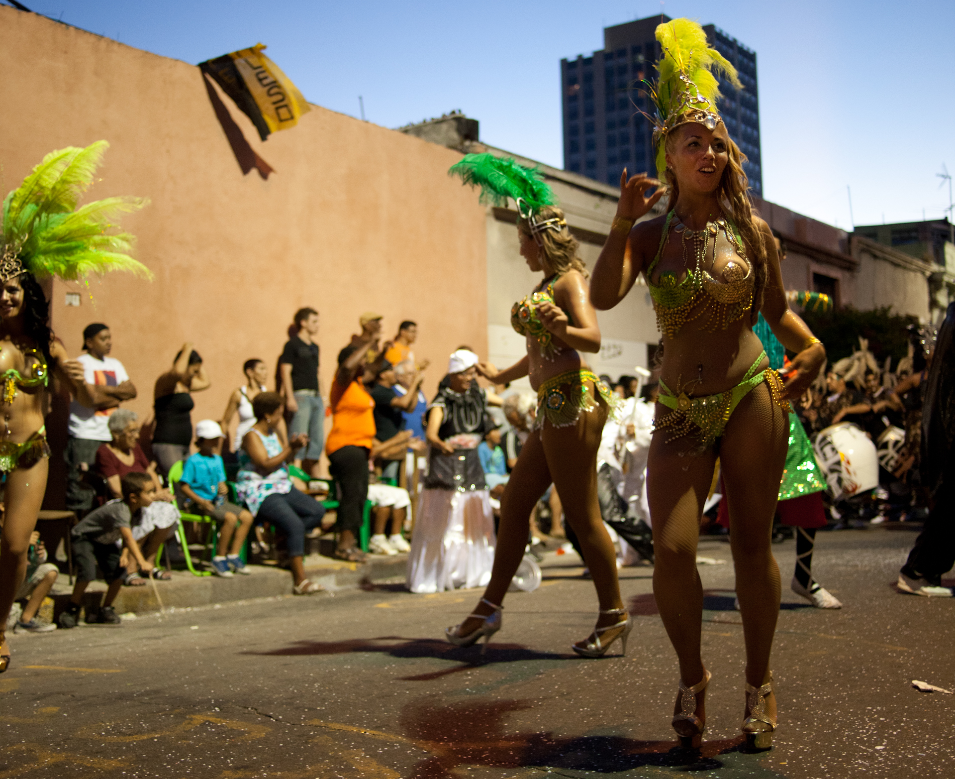 Las LLamadas, Barrio Sur y Palermo, Montevideo, Uruguay. Camera: Canon EOS 5D Mark II Lens: Zeiss Distagon T* 2/28 ZE 0 ISO: 1000